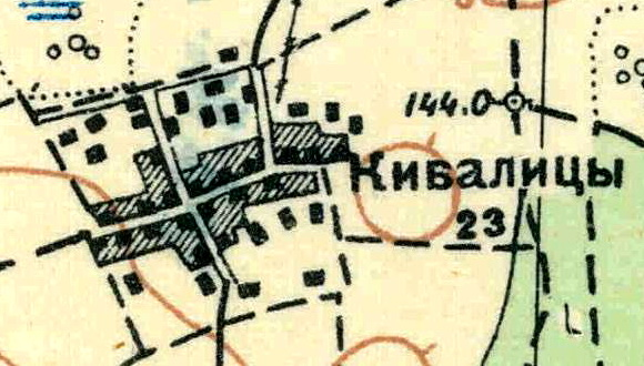 Топографическая карта Ленинградской области, квадрат О-35-24-А-а (Клясина), деревня Кивалицы